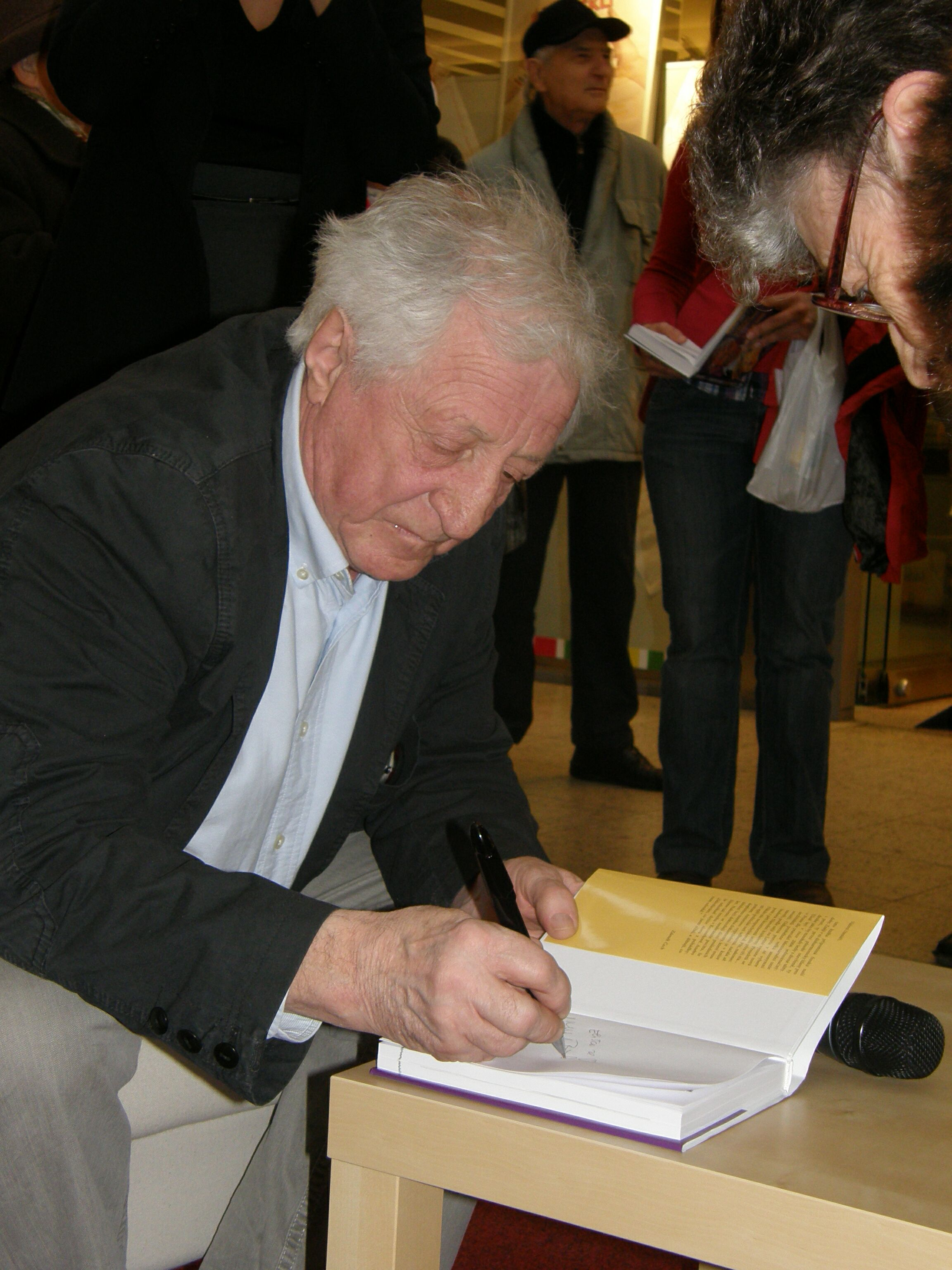 Pavel Bobek na křtu knihy Střepiny chobotnice aneb Národ sobě (Brno, Vaňkovka)